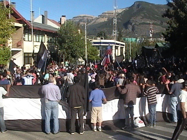 Protestas en Coyhaique (Chile) en el marco de las protestas en Aysén de 2012.